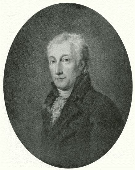 Portret van Gijsbert van Hogendorp, de Eerste Nederlandse Grondwet is van zijn hand. Het portret is rond 1810 gemaakt.